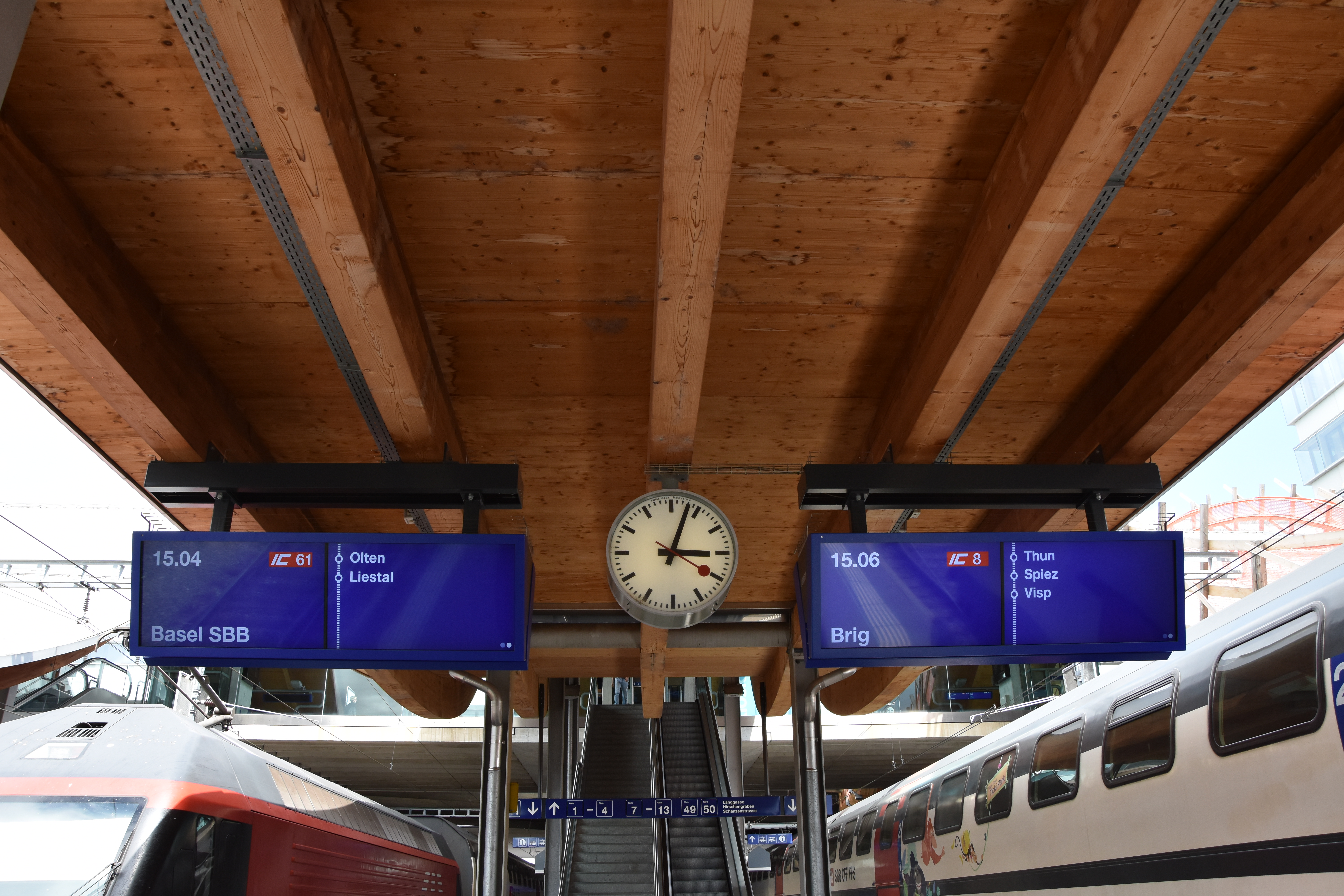 Panneaux annonçant l'IC 61 pour Bâle CFF et l'IC 8 pour Brigue en gare de Berne (juillet 2020).